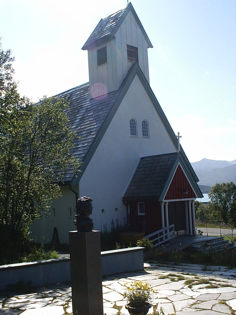 Berg kirke på Senja. I forgrunnen står en minnestøtte for Ingrid Bjerkås